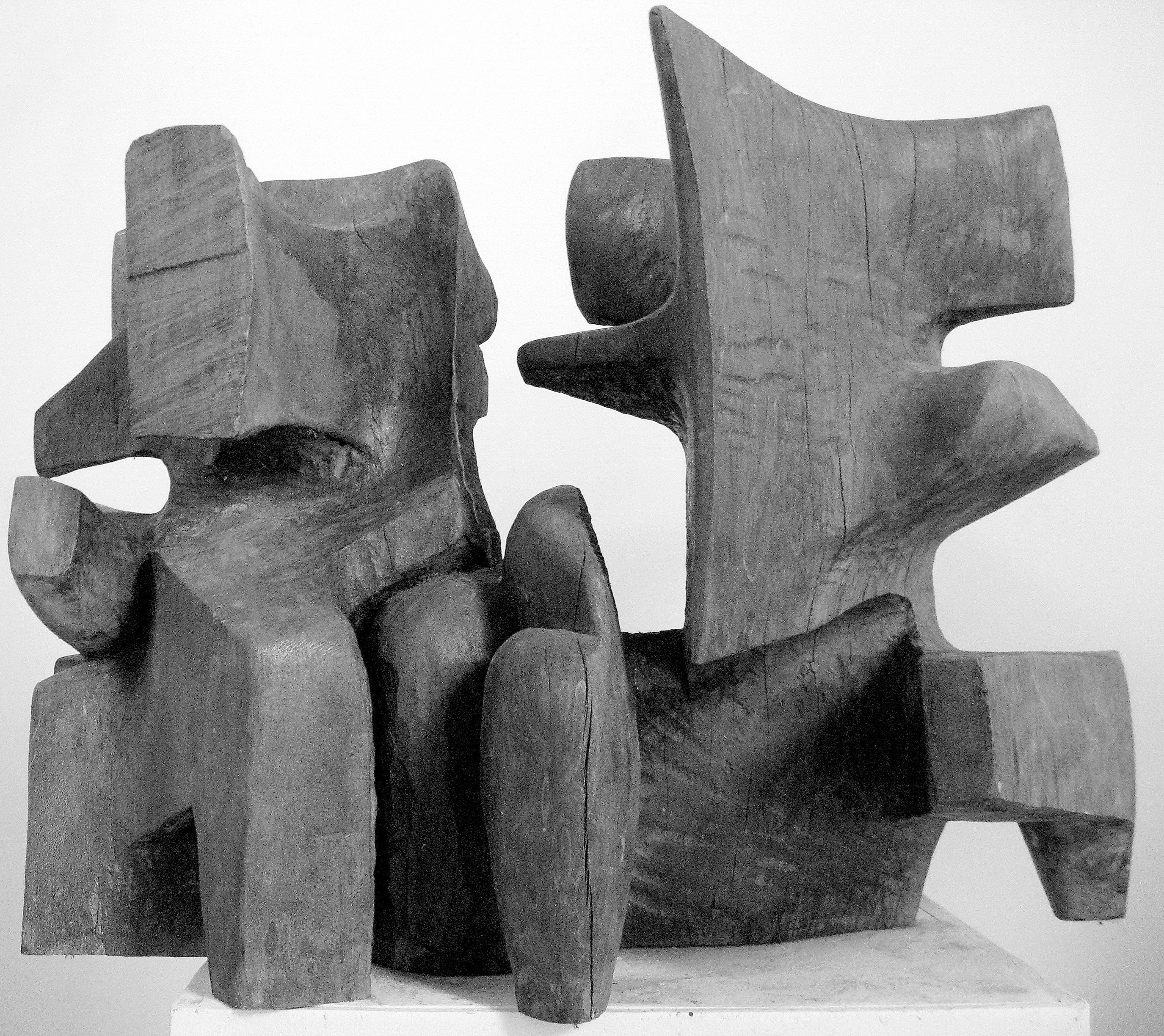 CONVERSATION NOIRE - bois 0,88 m x 0,60 m - années 1980